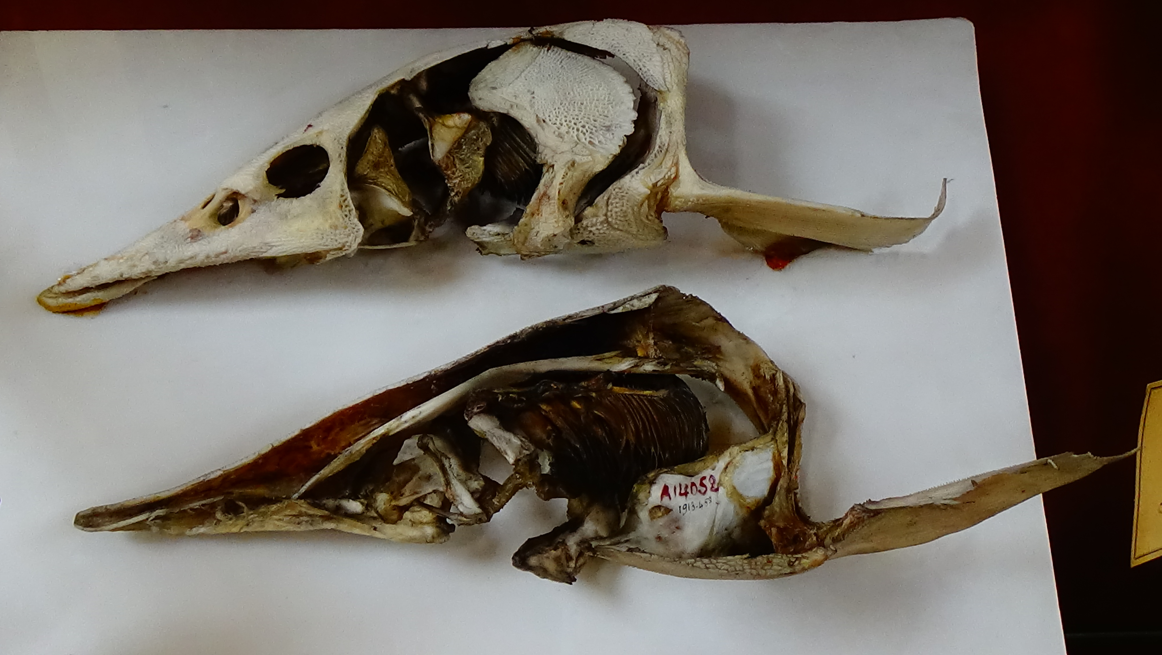 Acipenseridae - face interne et externe - squelette mnhn Paris